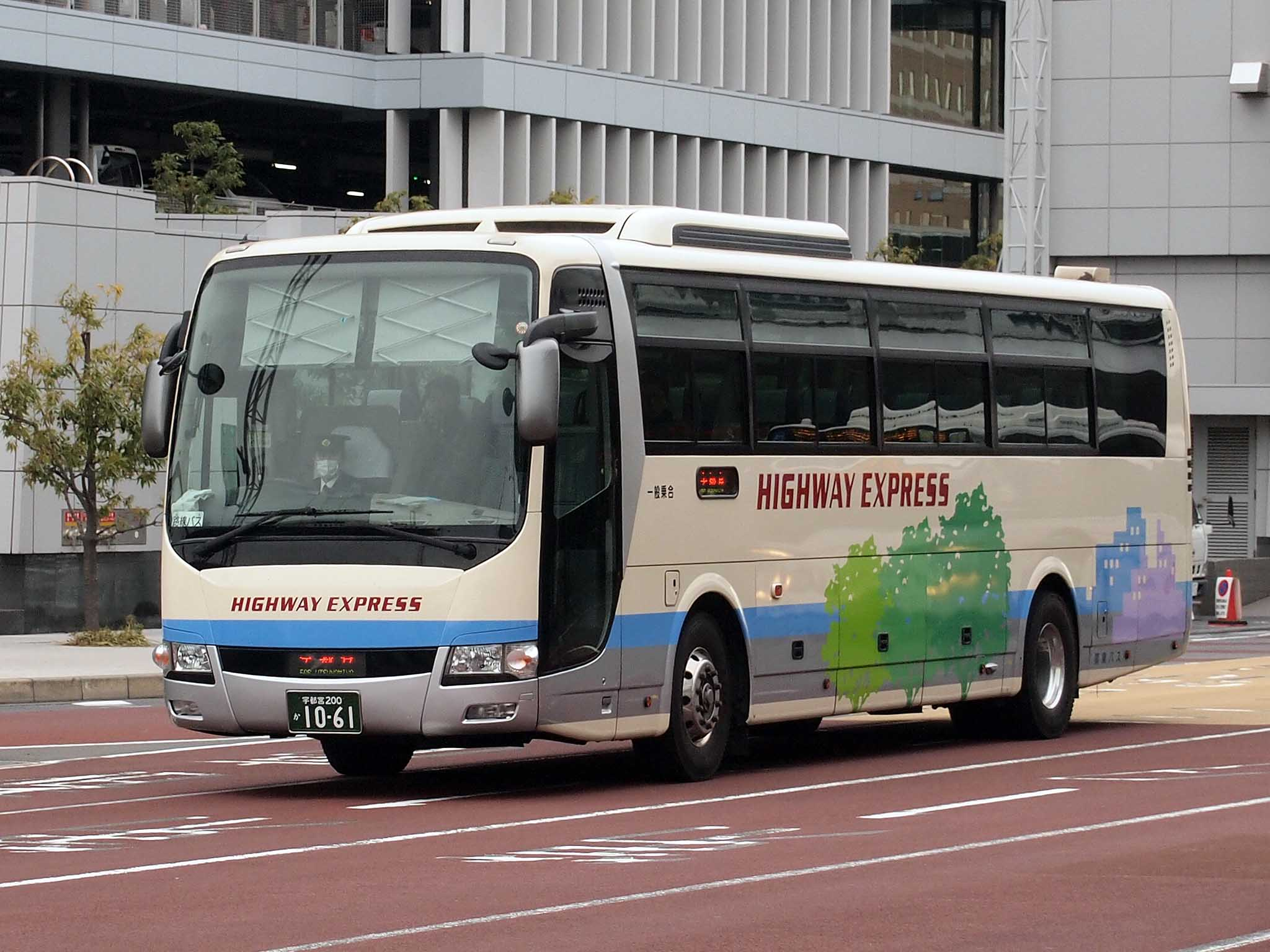 関東自動車の三菱ふそう・エアロエース。北関東ライナー宇都宮 - 水戸線開設時に導入され、宇都宮発着の北関東ライナーと空港リムジン「マロニエ」に就役する。 型式：BKG-MS96JP 登録番号：宇都宮200か1061 撮影地：東京国際空港国内線第二ターミナル